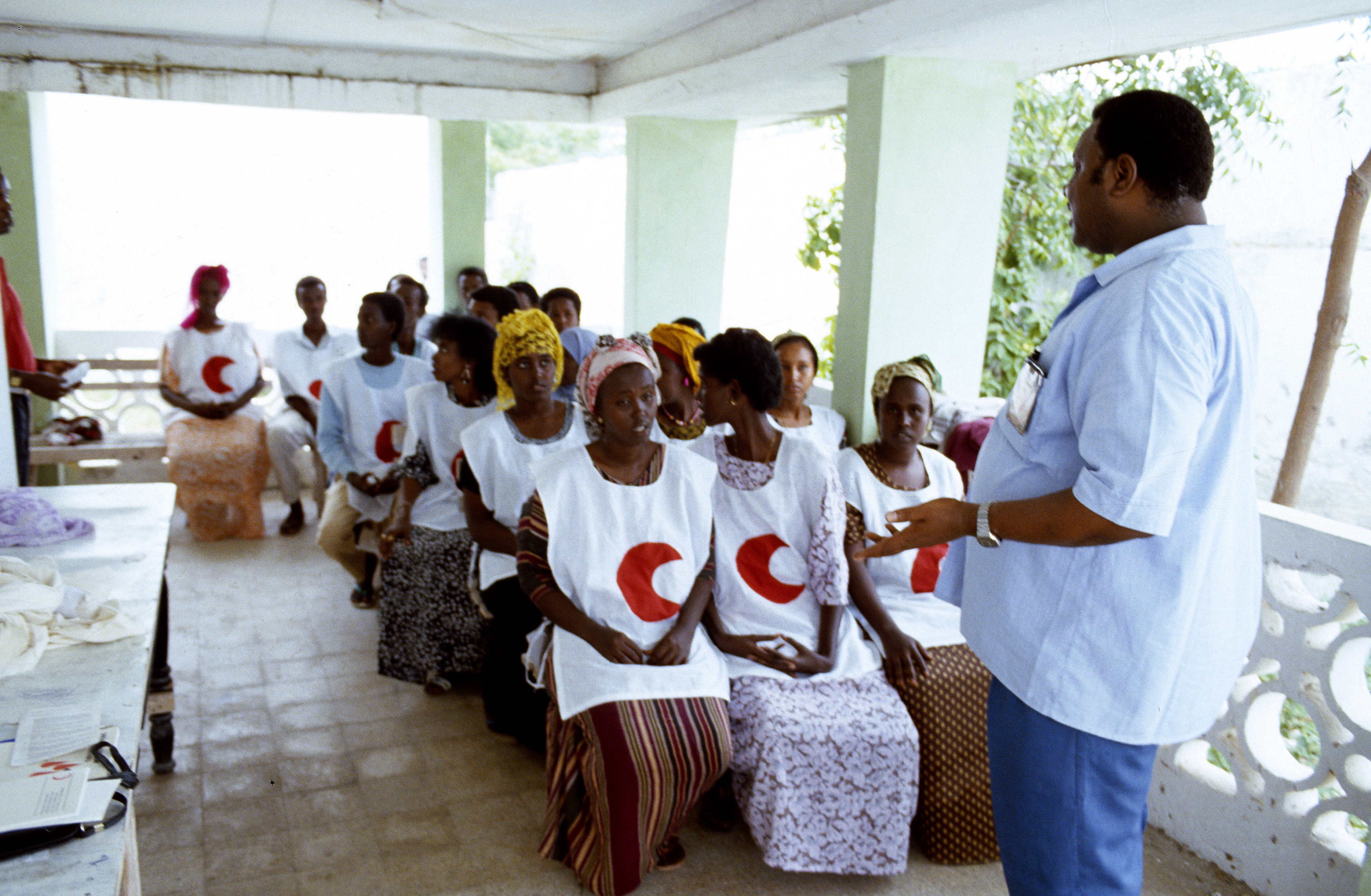 Фотографія зроблена працівниками МКЧХ в Сомалі